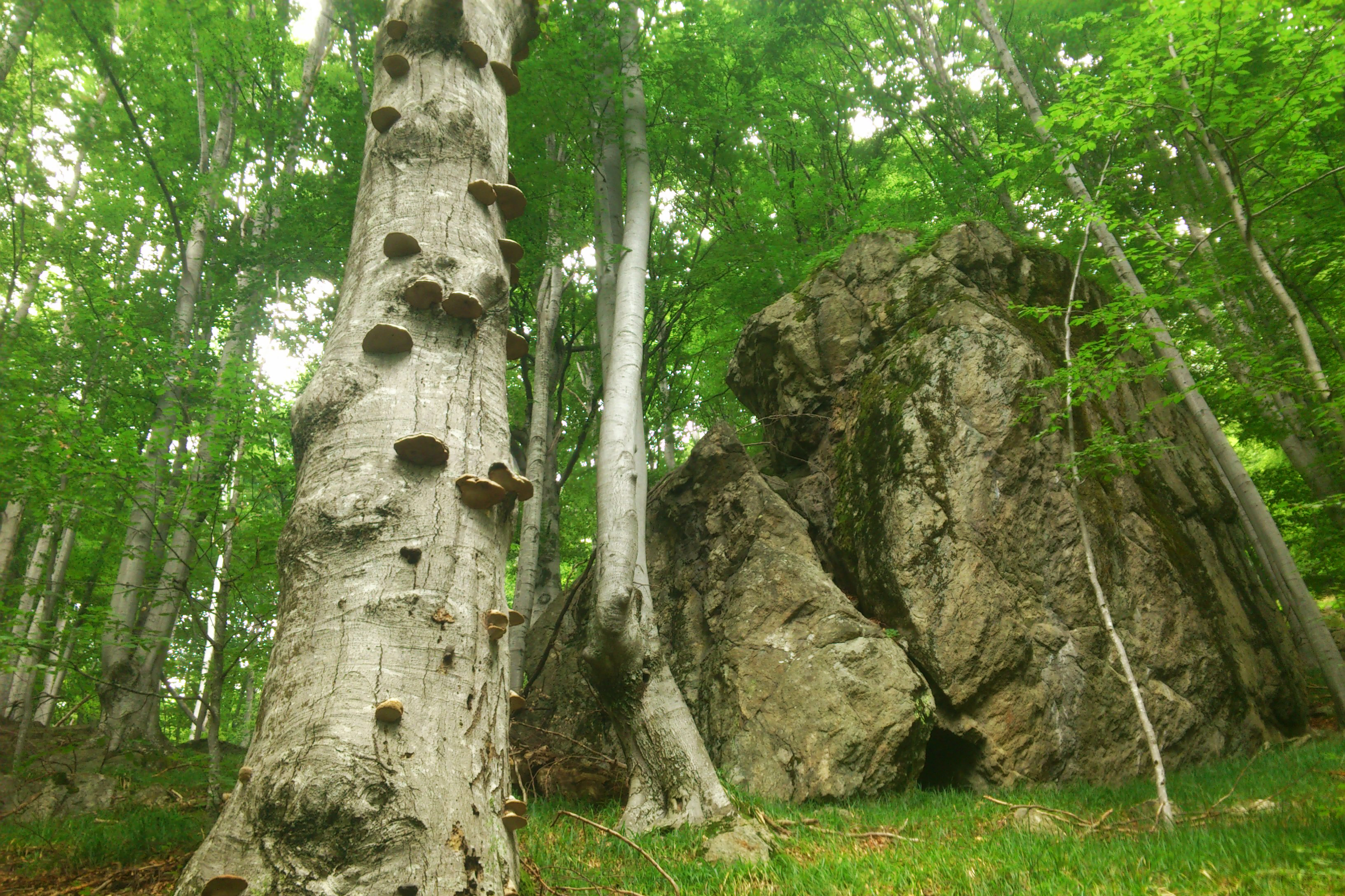 Централен Балкан, Стара планина